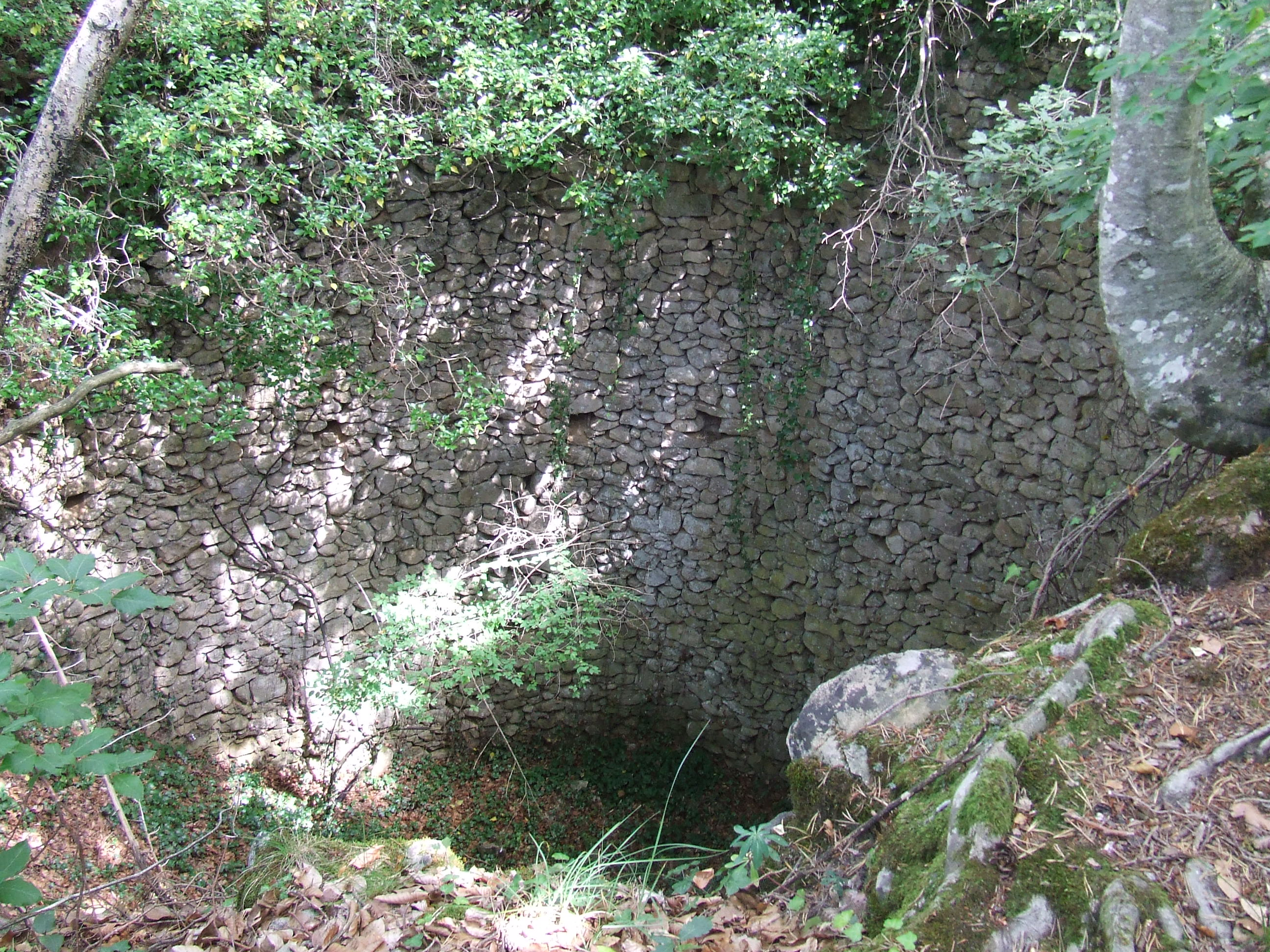 La Poua de la Font del Barbot (Castellcir, Moianès)